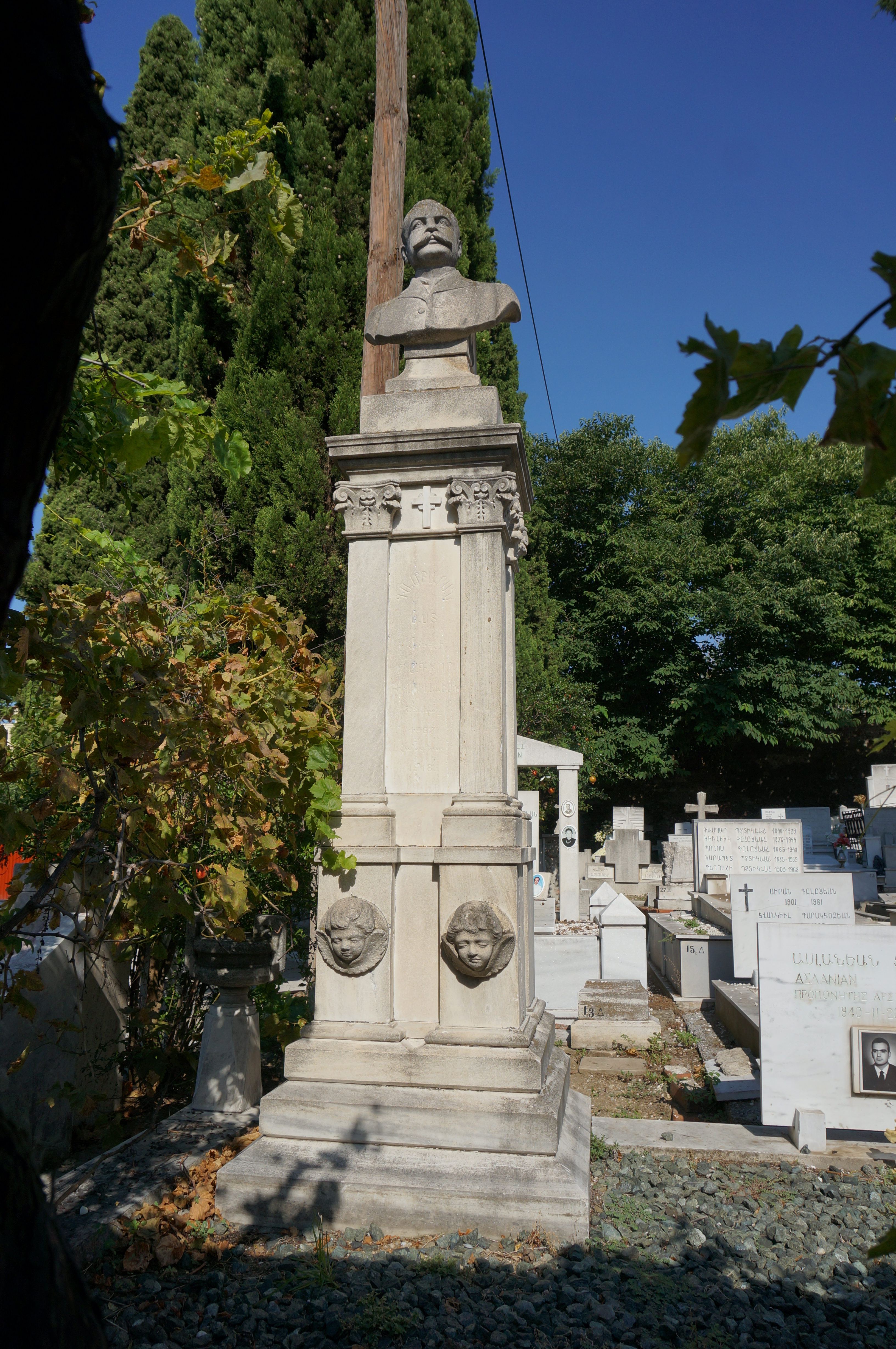 dans la ville de Salonique.